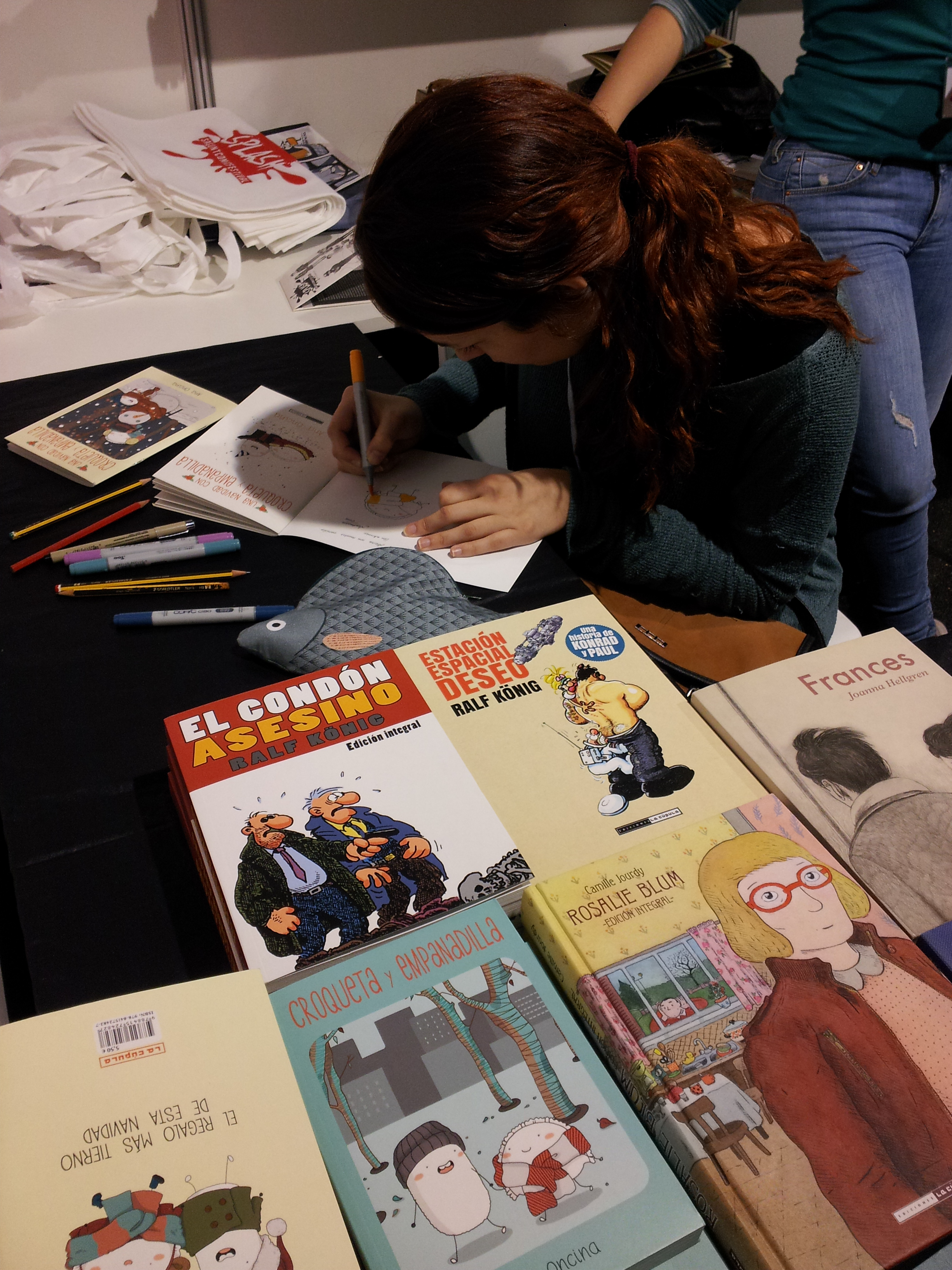 Festival de còmic Splash Sagunt 2015.